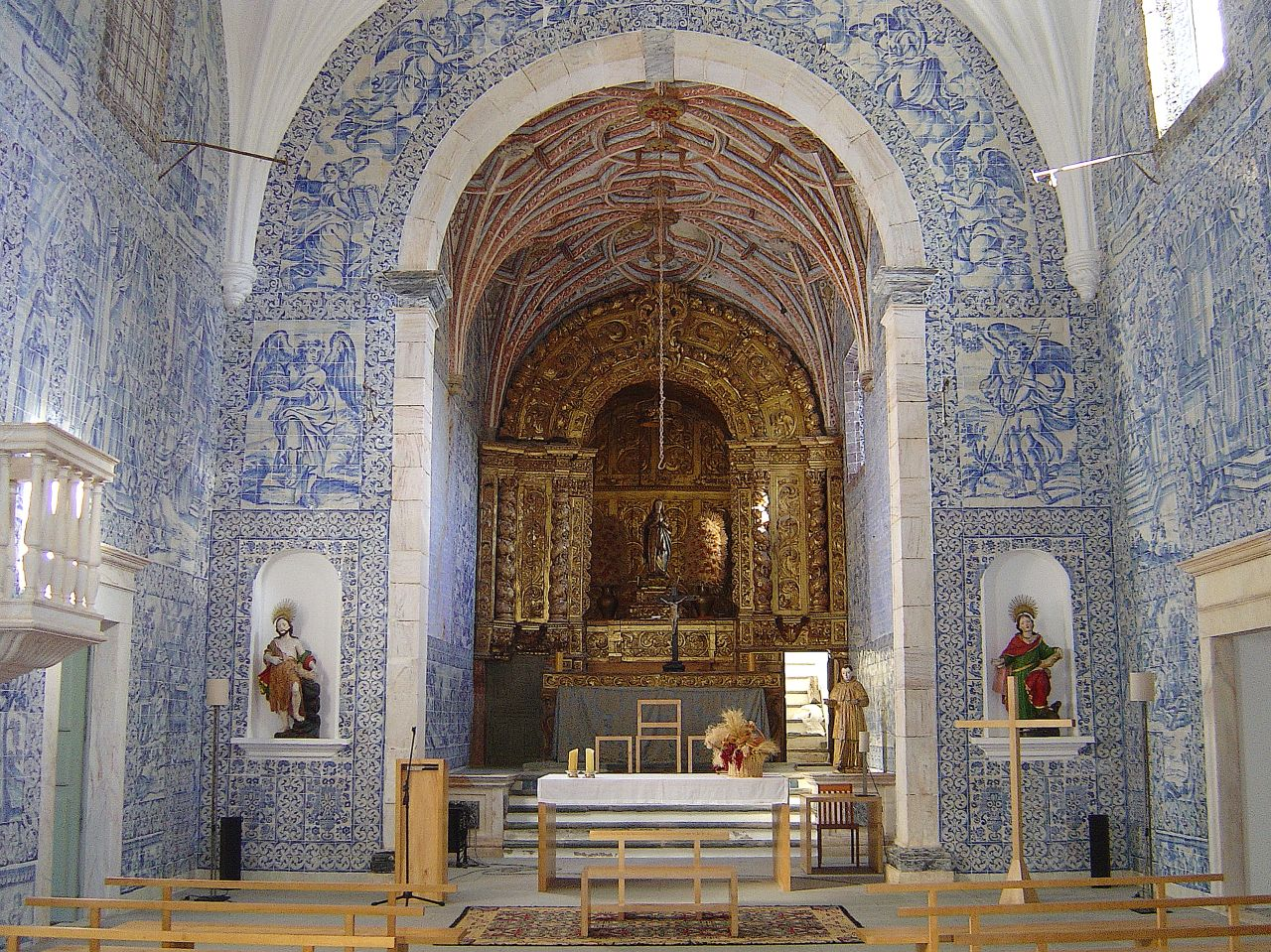 Convento dos Loios - Arraiolos - Portugal